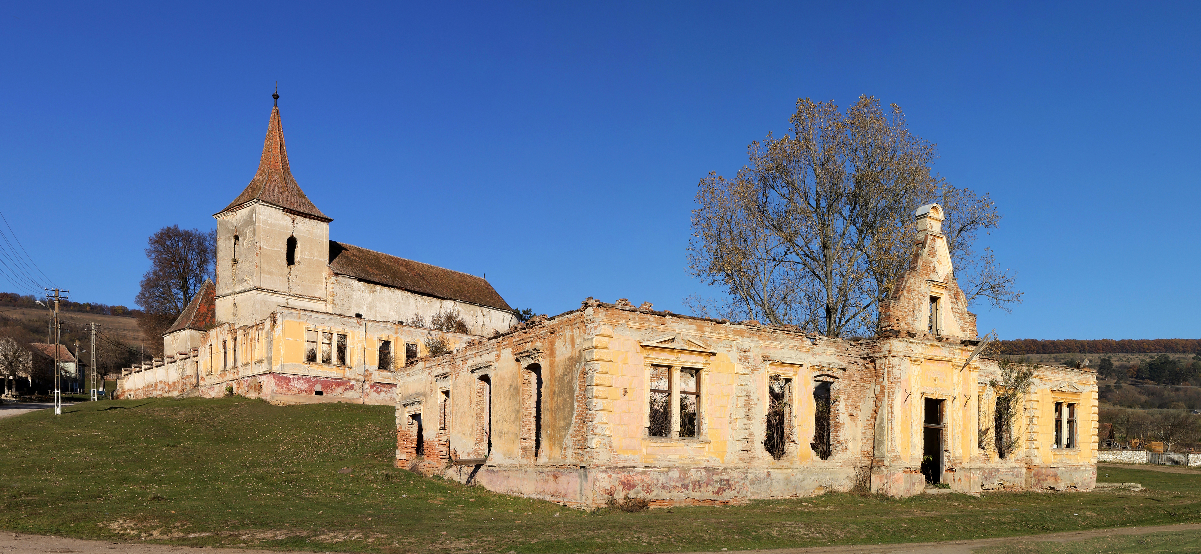 Biserica evanghelică fortificată 01